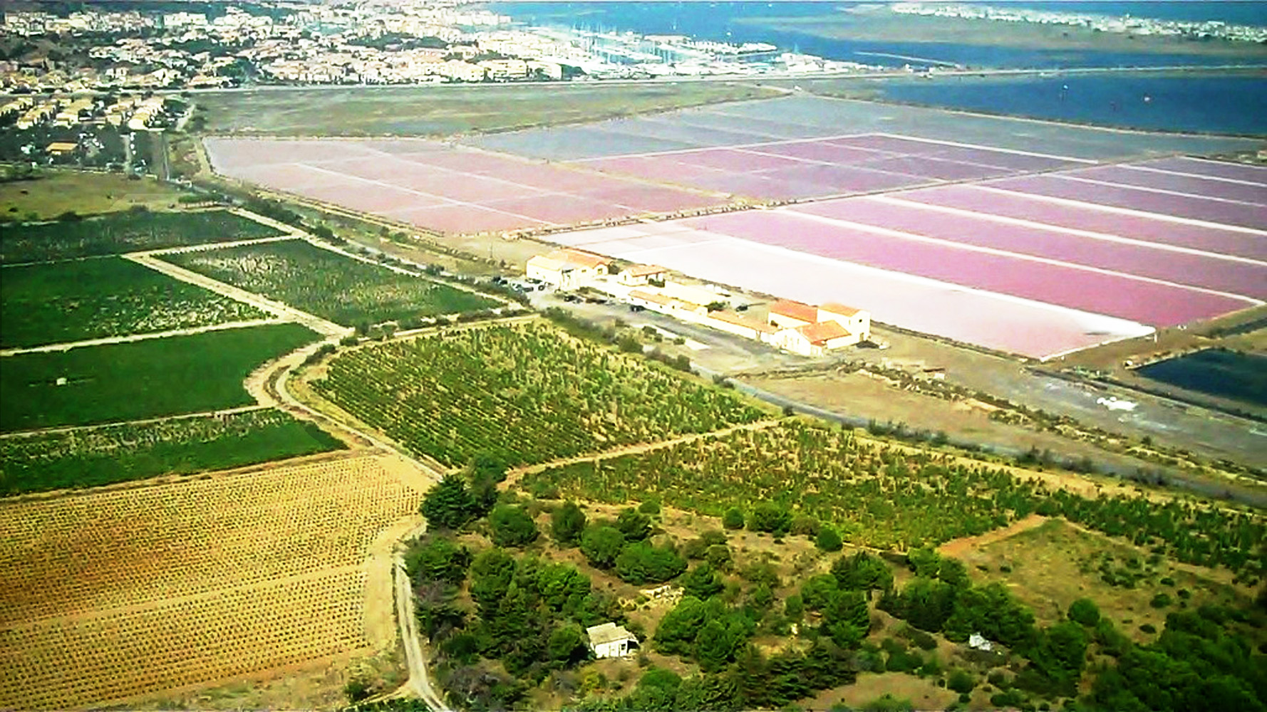 Vignoble de Gruissan jouxtant les salins